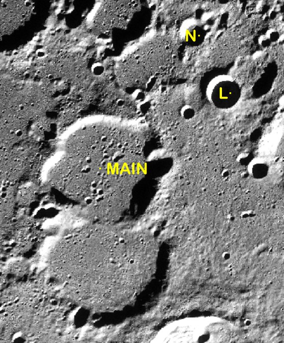 Cráter lunar Main. Cráteres satélite. (Imagen LRO)